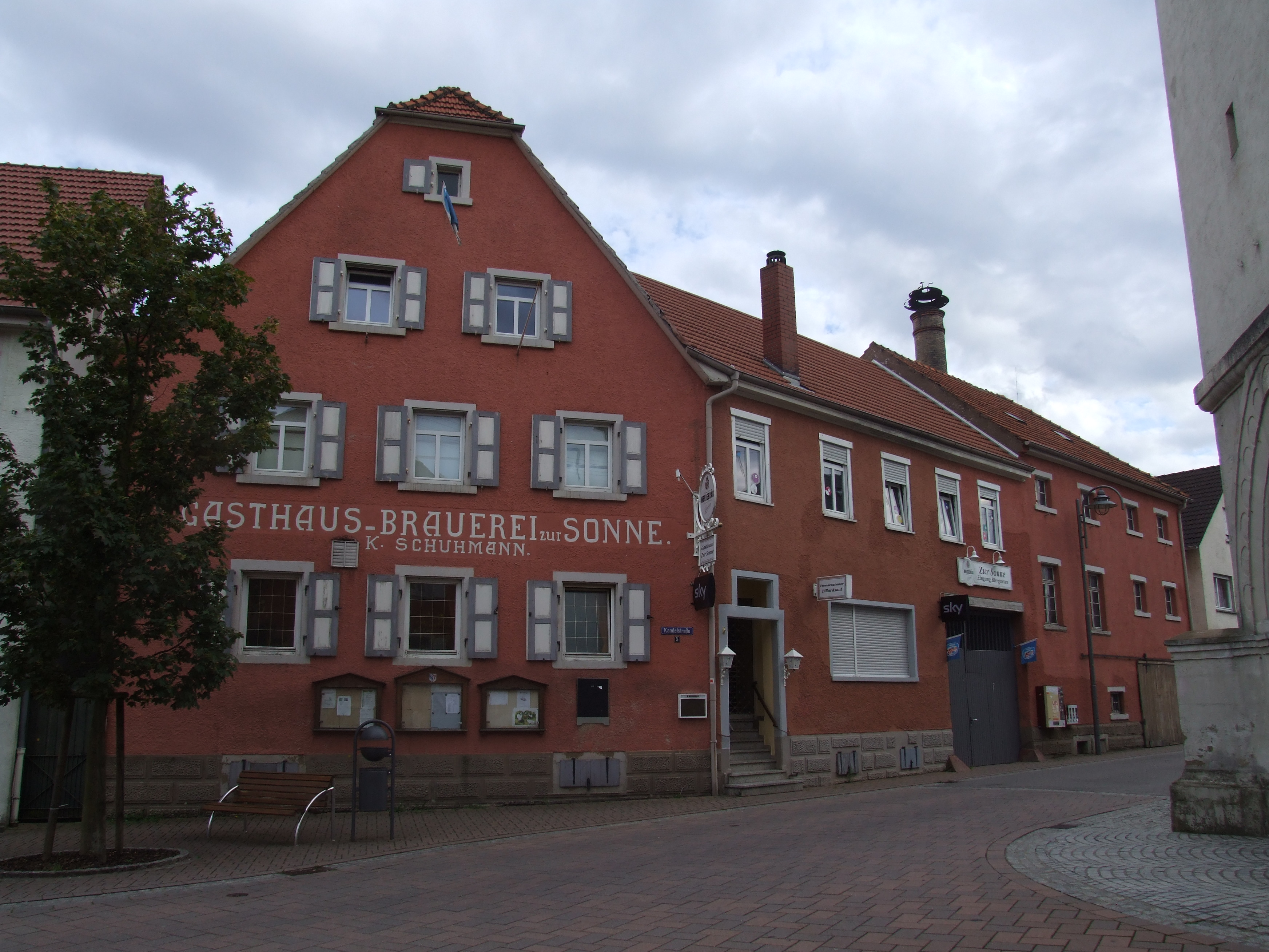 Kandelstraße 5, Eschelbronn. Gasthaus zur Sonne am Marktplatz.